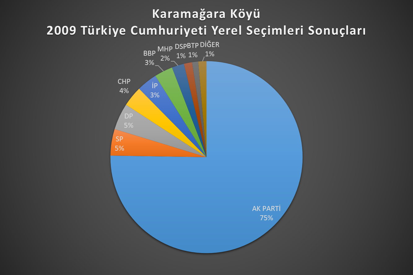 Kahramanmaraş ili Elbistan ilçesi Karamağara köyüne dair istatistik.